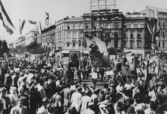 Budapest, II. Weltfestspiele, Festumzug Weltjugendspiele in Budapest beendet. UBz: Während der Schlußdemonstration.Foto:Illus 28.8.49